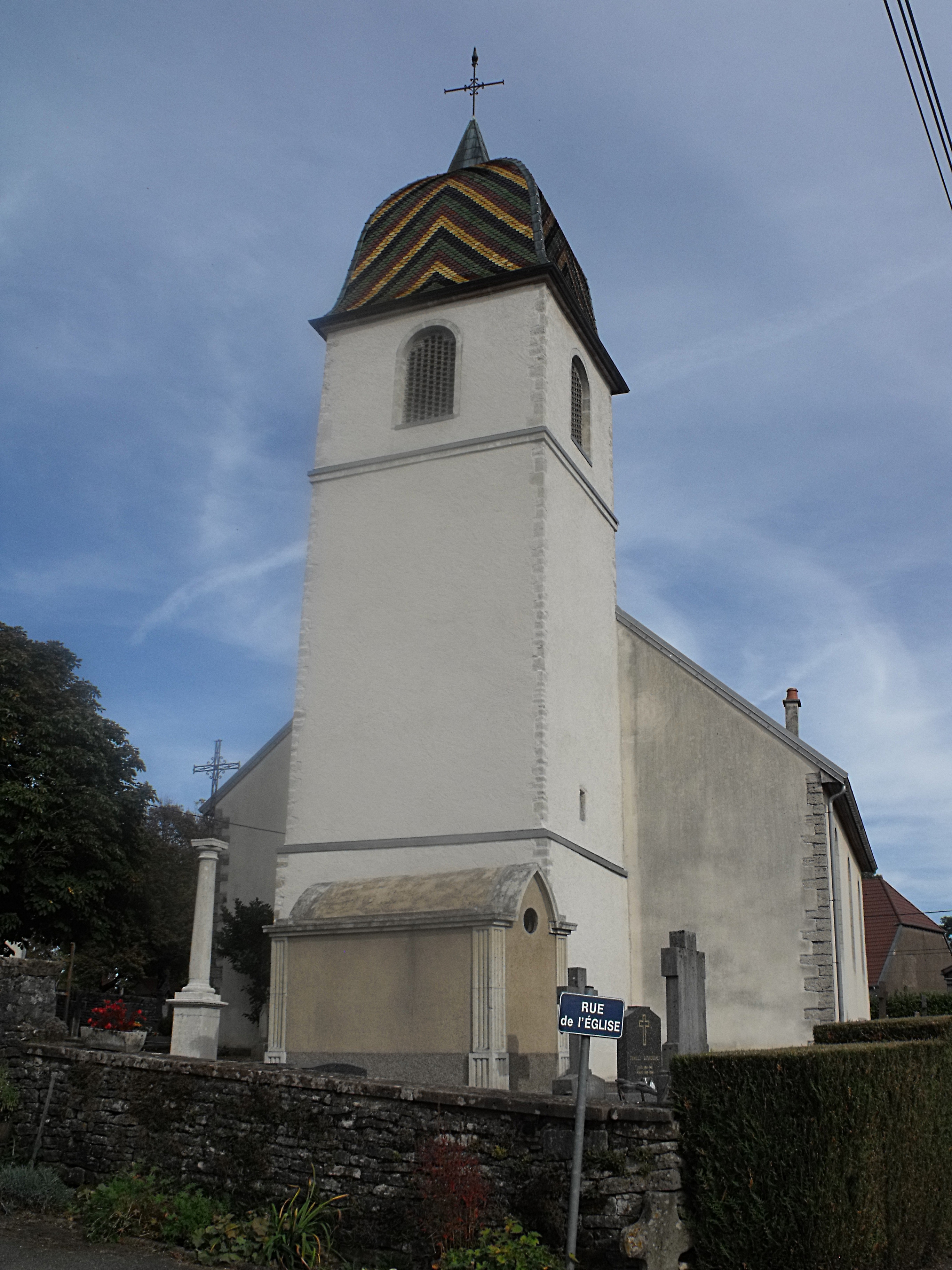 Eglise de Tournans, Doubs, France